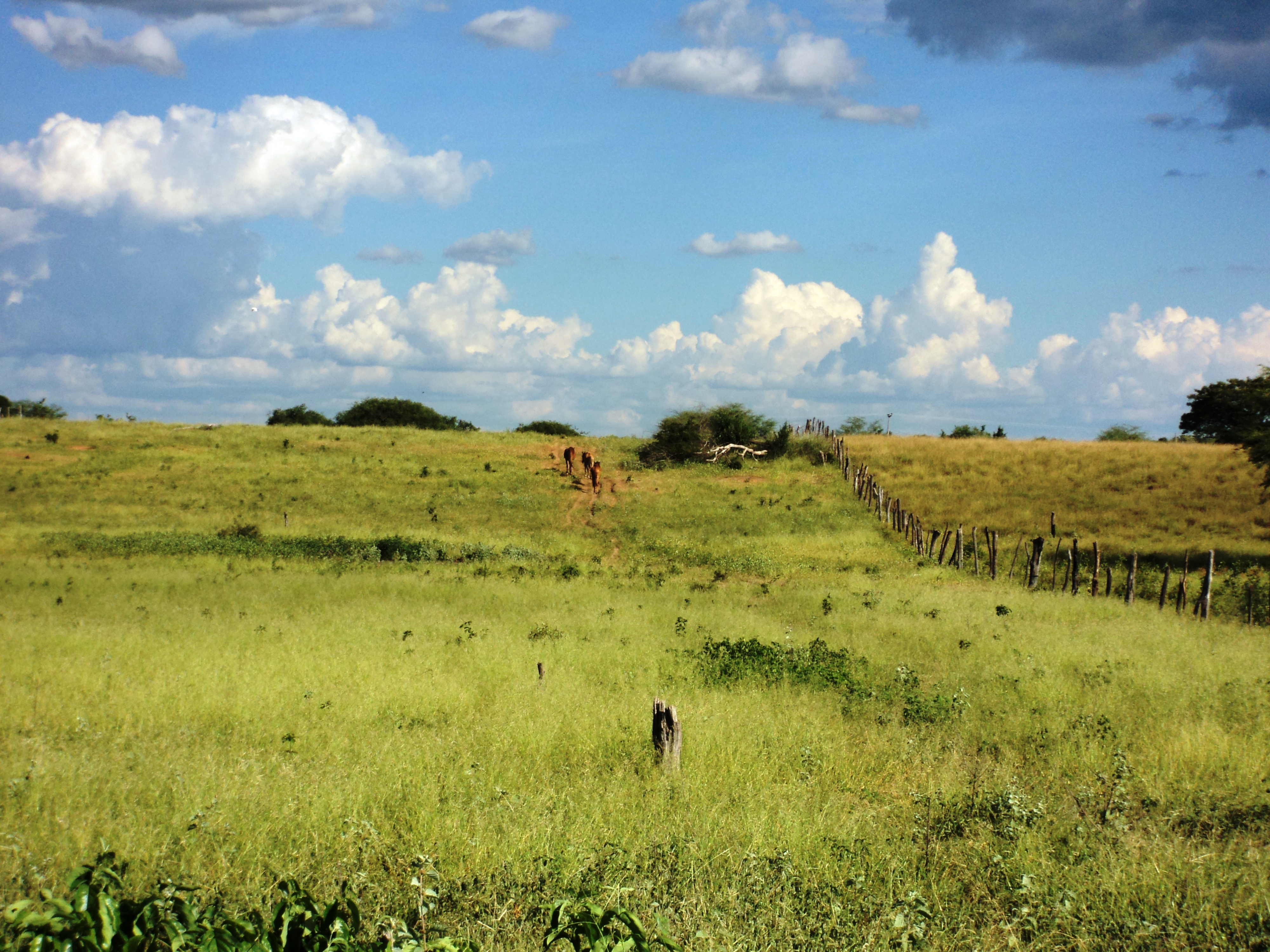 Zona Rural de Sítio do Mato, Bahia, Brasil.